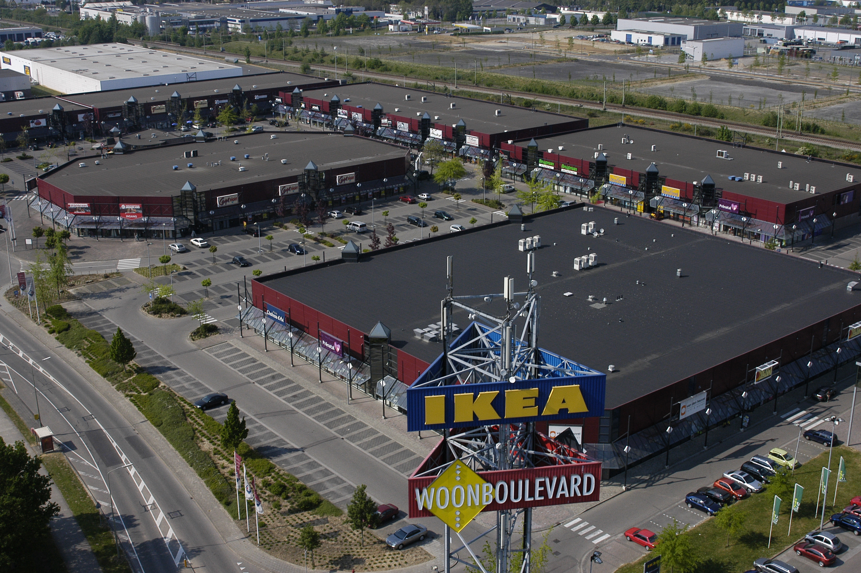 Bovenaanzicht van Woonboulevard Heerlen